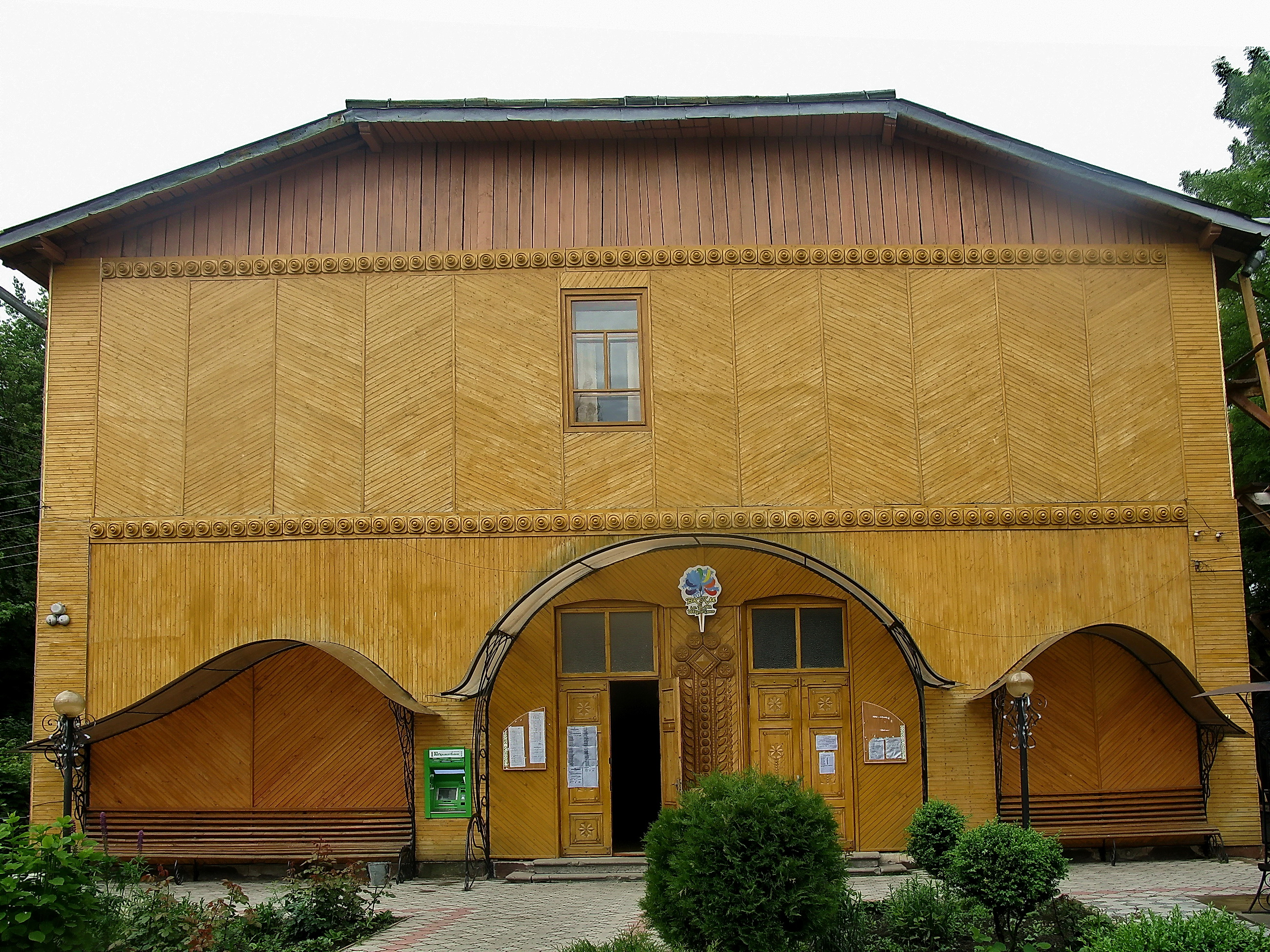 Будинок крайової школи різьбарства. токарства та металевої орнаментики ,де працював Шкрібляк В. Ю. - майстер-різьбар., м. Вижниця, вул. Загула,13